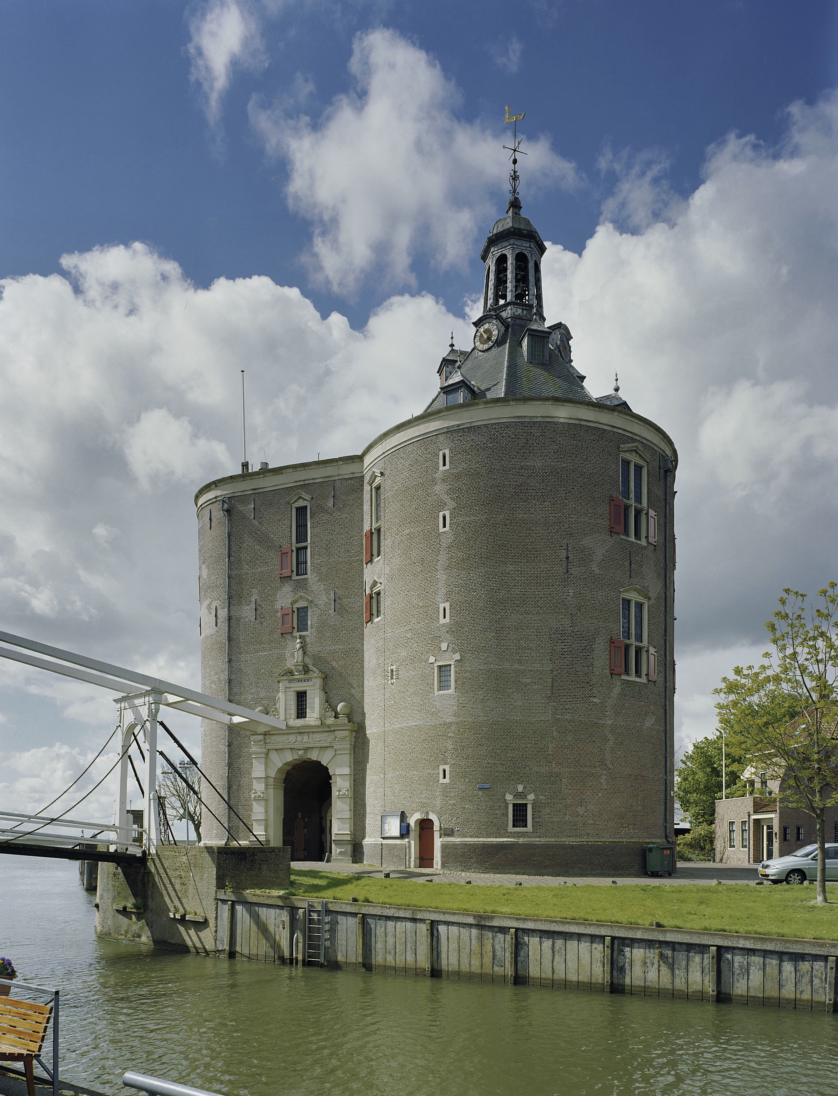 Dromedaris: Overzicht, ronde hoofdtoren heeft een bekroning met koepeltorentjes (opmerking: Gefotografeerd voor Monumenten In Nederland Noord-Holland)